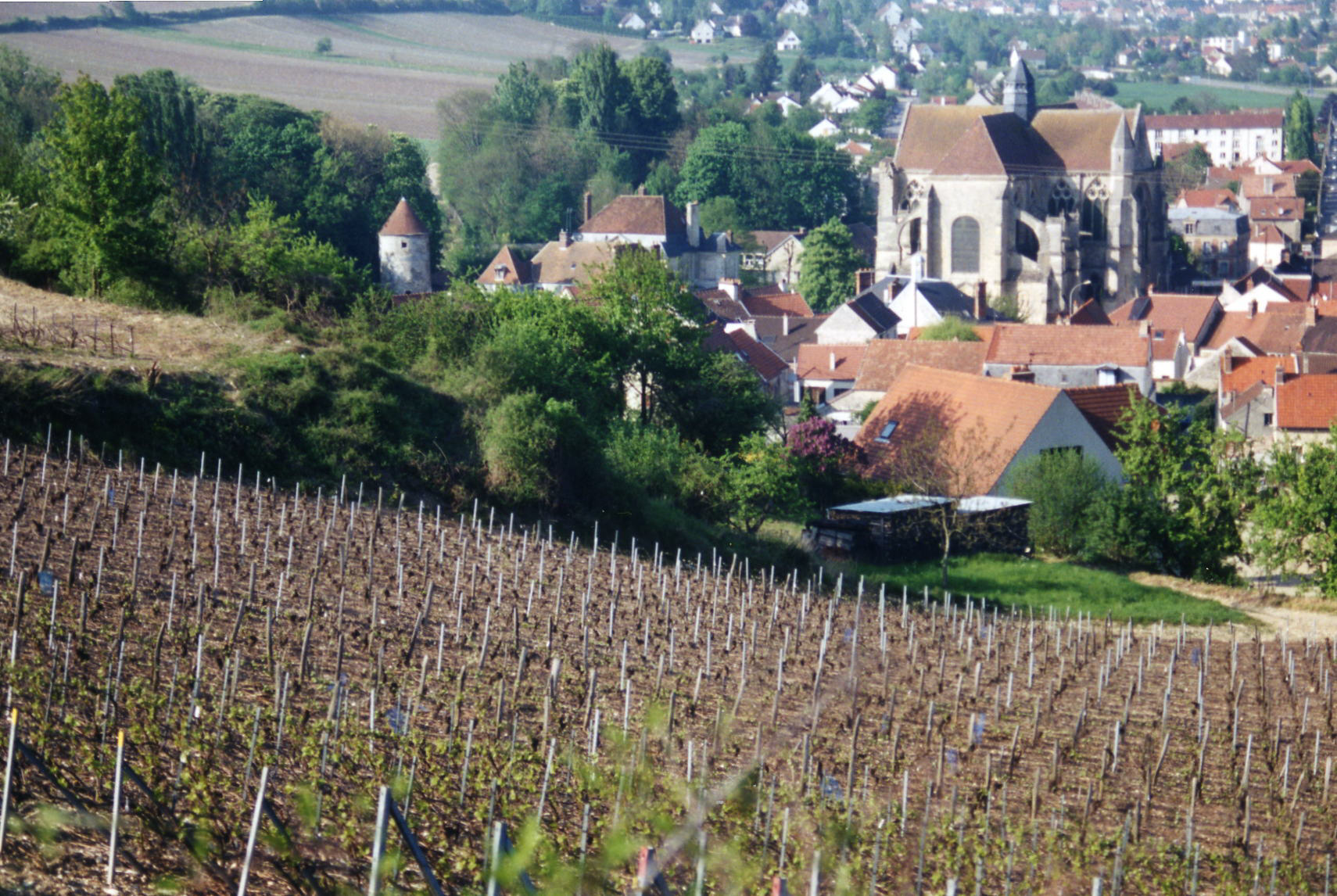 Photo du village d'Essômes-sur-Marne (02 - France). Auteur :Marie-Paule Huot